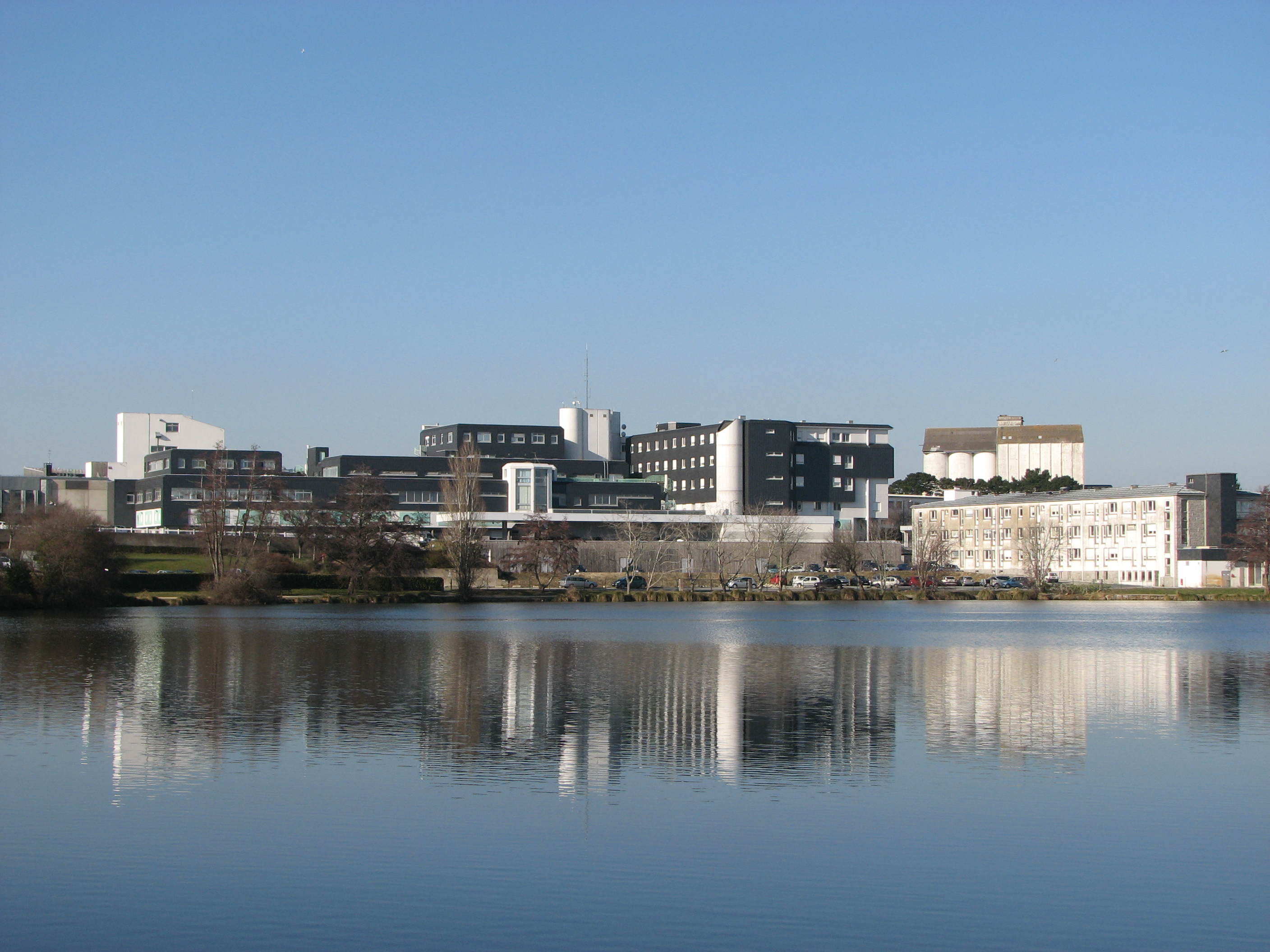 Hôpital Prosper Chubert de Vannes, avec l'étang au Duc en premier plan.